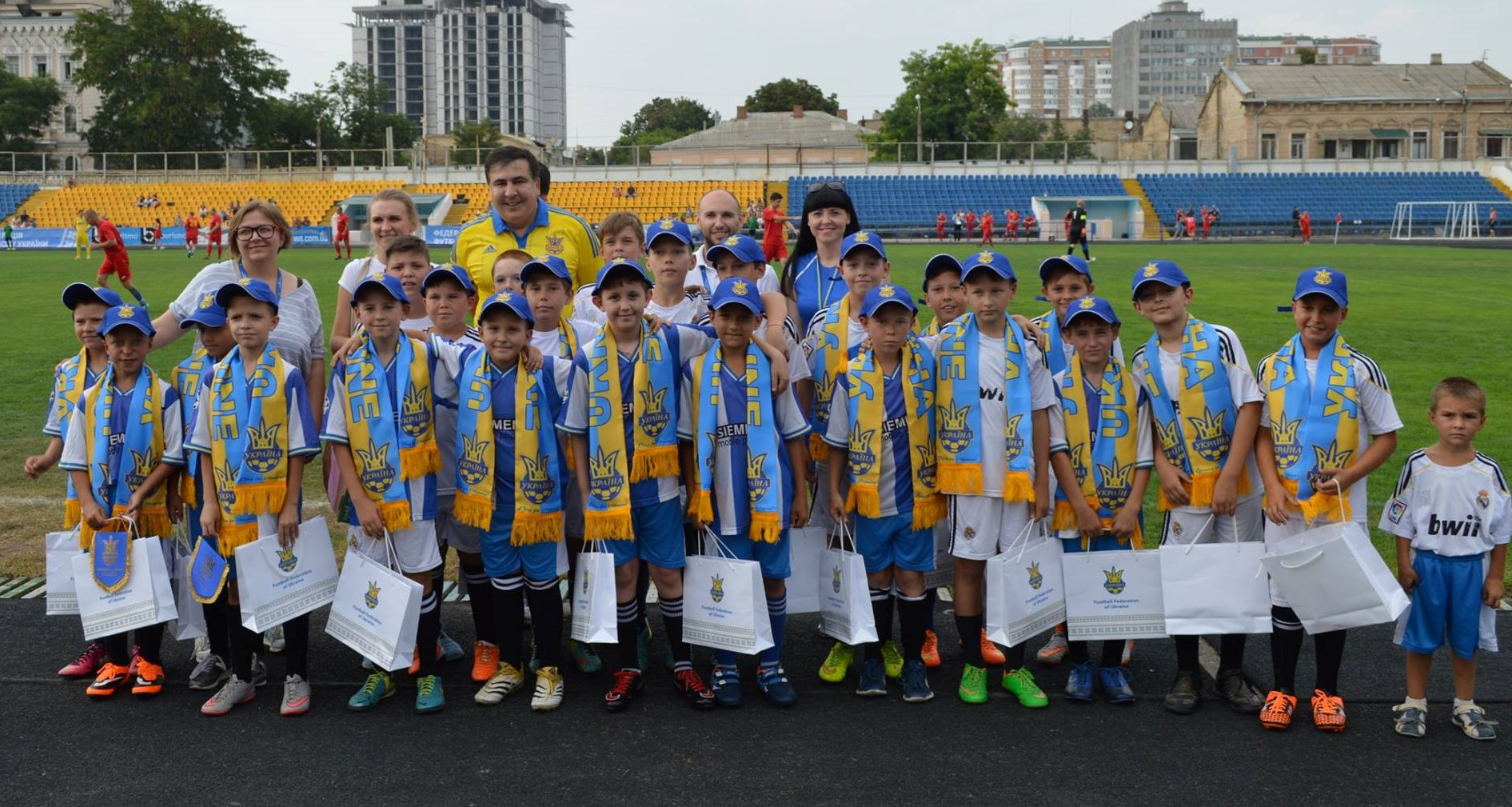 Кубок Губернатора